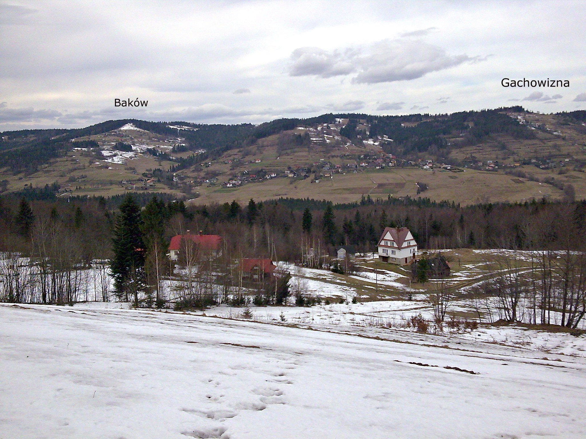 Pasmo Pewelsko-Ślemieńskie widok z południa na (od lewej): Baków (Czeretnik) (766 m n.p.m.) i Gachowizna (758 m n.p.m.). W dolinie wieś Hucisko.